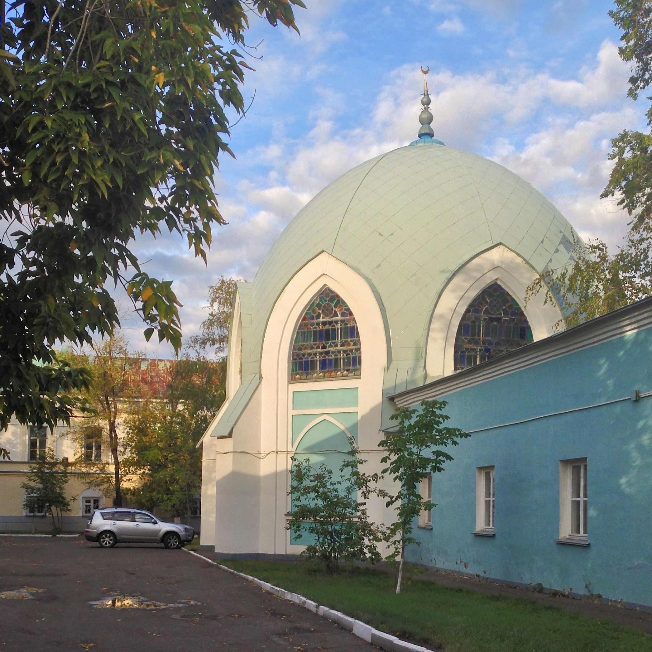 Мечеть с минаретом (Оренбургская область, Оренбург, Парковый пр., 6)